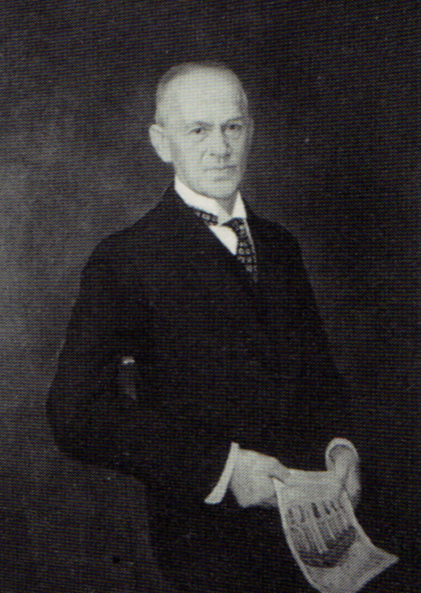 Georg Wertheim (* 11. Februar 1857 in Stralsund; † 31. Dezember 1939 in Berlin), deutscher Kaufmann